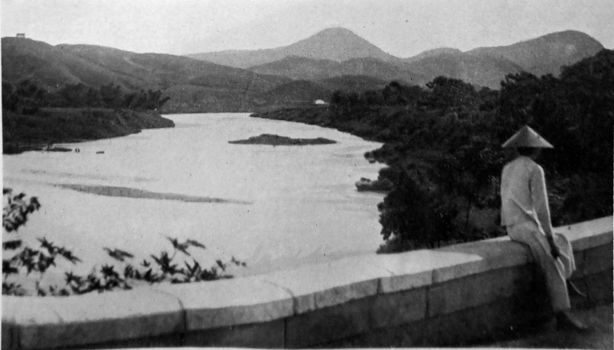 Photographie du Gouverneemnt général d'Indochine faites avant 1931 et publiée en 1931.